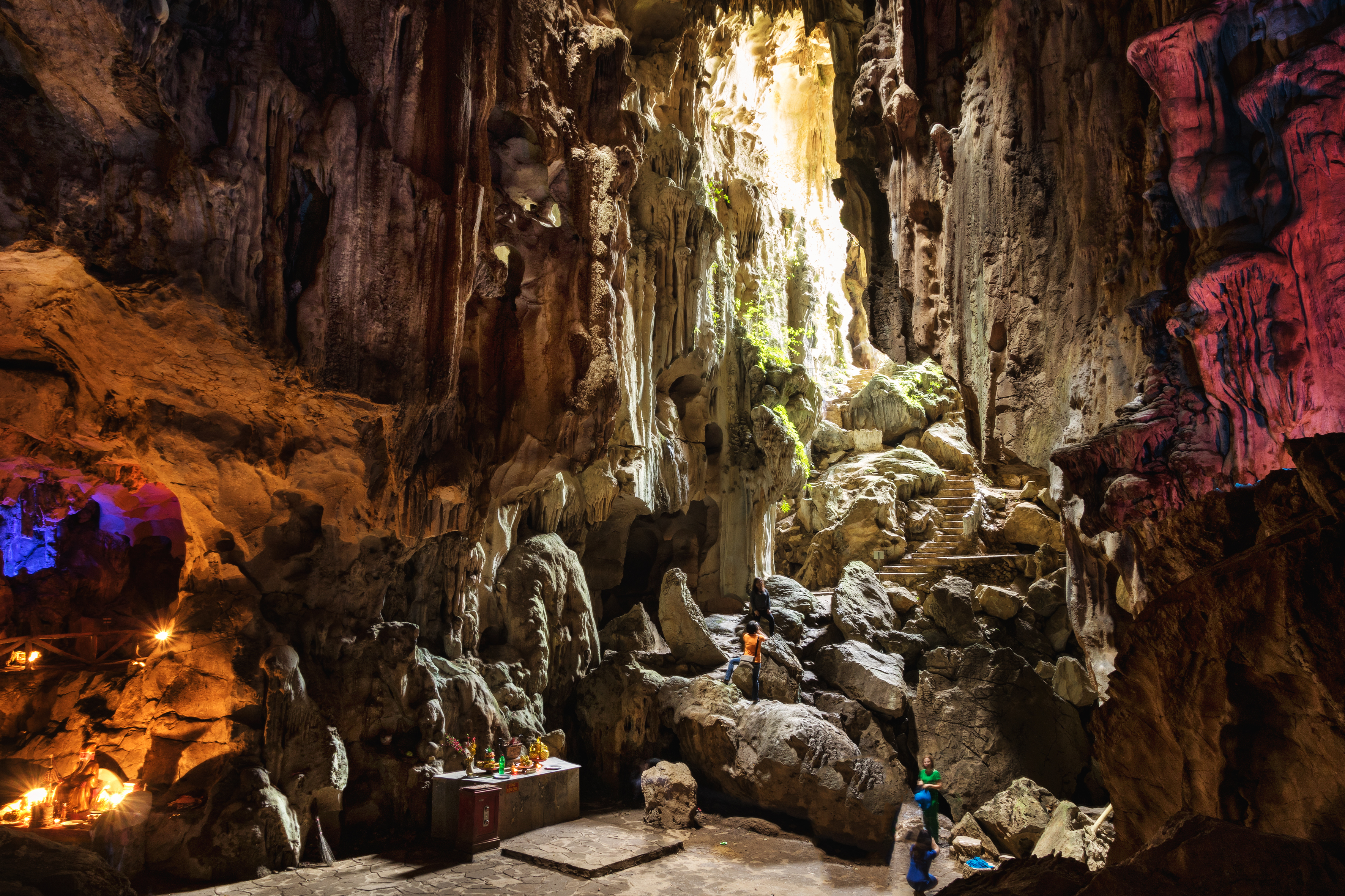 Trong động Tam Thanh thuộc địa phận phường Tam Thanh Thành phố Lạng Sơn, tỉnh Lạng Sơn, Việt Nam.